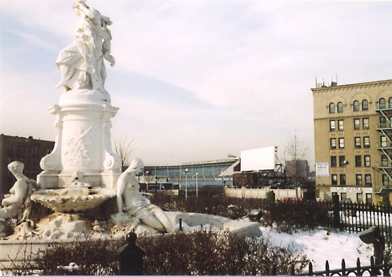 Heinrich-Heine-Denkmal in der Bronx, New York